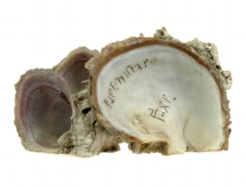 Handschrift. Rencongschrift op een schelp